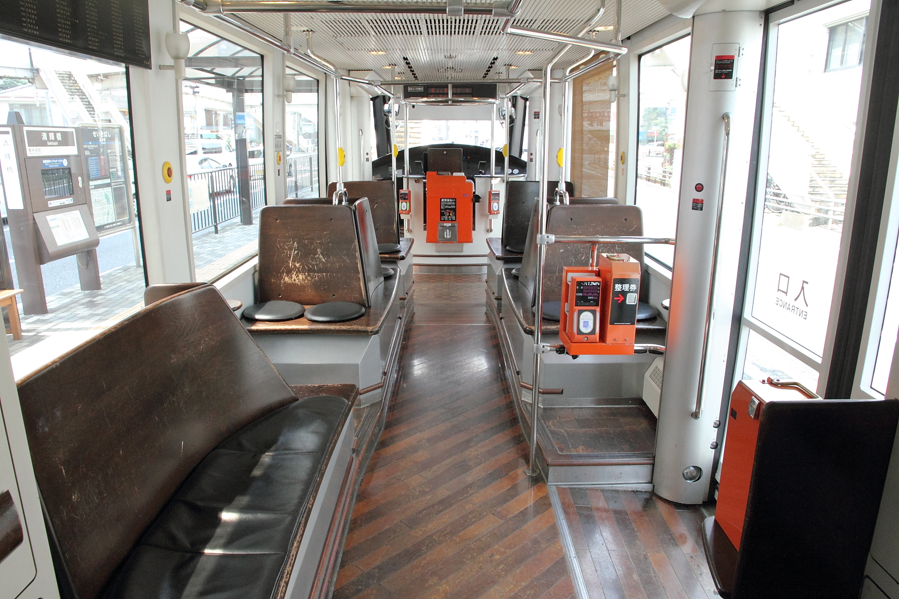 岡山電気軌道9200形9201Aの車内。連結部側から運転台側に向って撮影。内装の使用材木はウォールナット材。